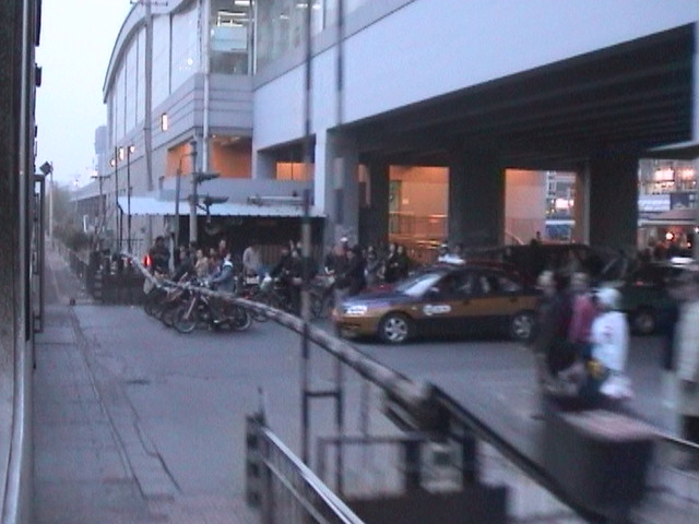 Animation